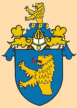 Erb rodu Lipovský z Lipovic